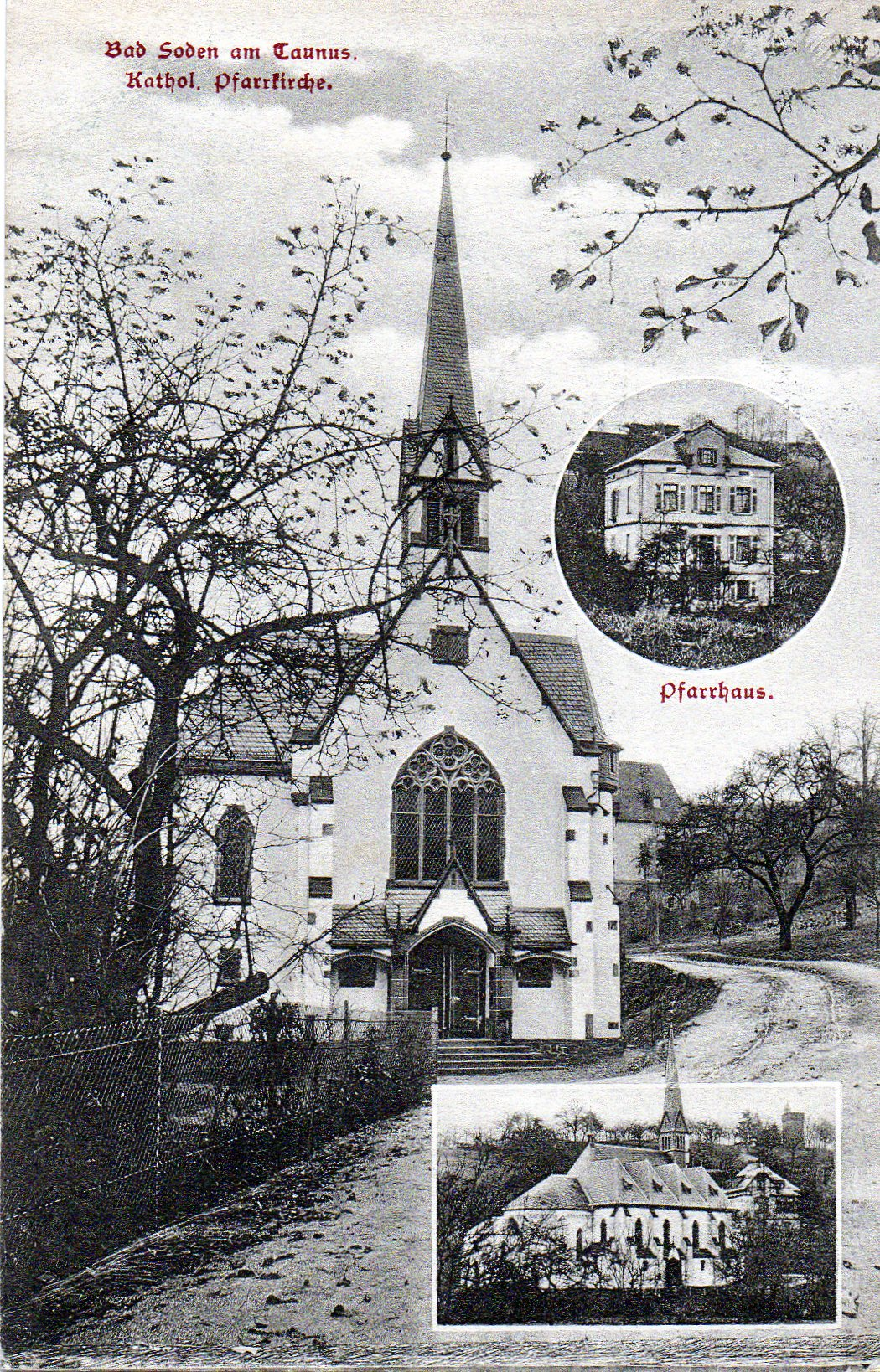 Alte Ansichtskarte der alten kath. Kirche in Bad Soden am alten Kurpark. 1906